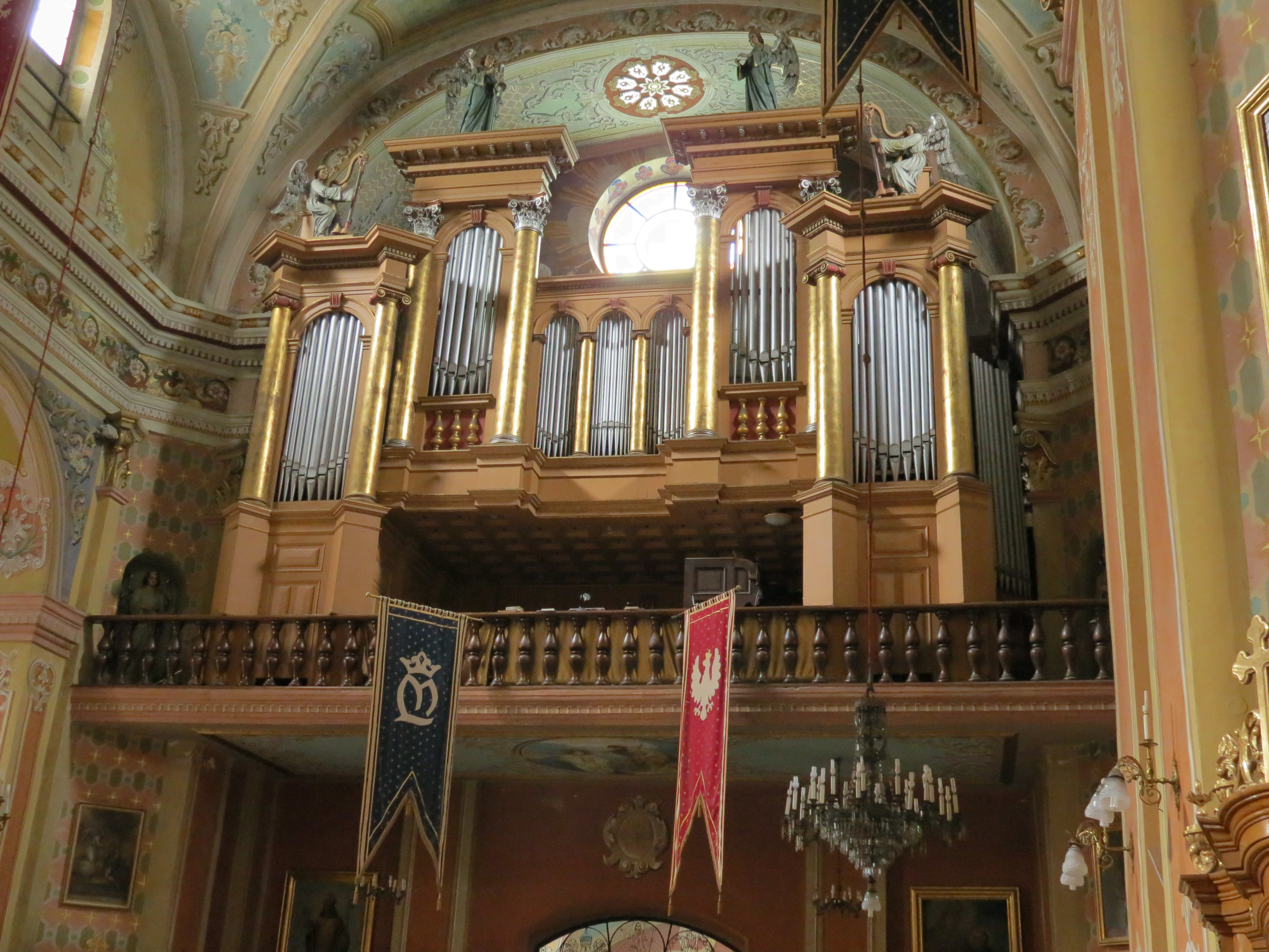 Jarosław, kościół p.w. św. Jana Chrzciciela, ob. par. p.w. Bożego Ciała, 1572, XVIII, 1890